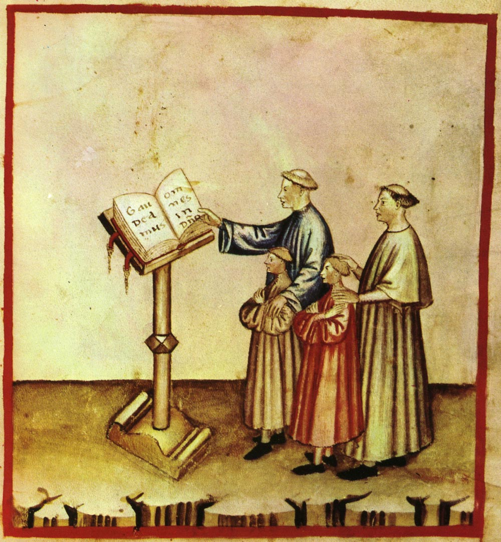 Tacuina sanitatis (XIV century) 4-aspetti di vita quotidiana, canto in chiesa,Taccuino Sani